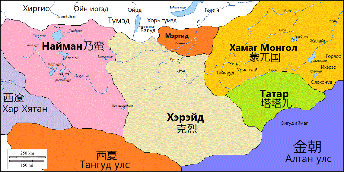 Монгол: 12-р зууны Монгол ханлиг аймгууд